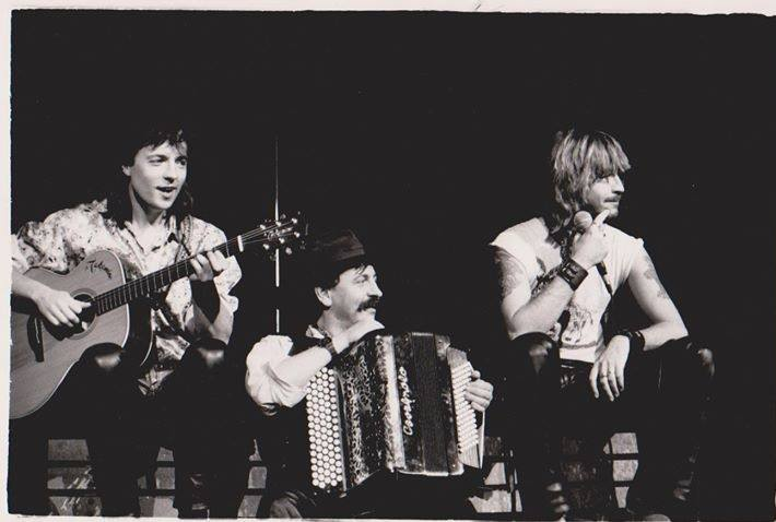 Spectacle Renaud " La Chetron Sauvage " Zénith 1986